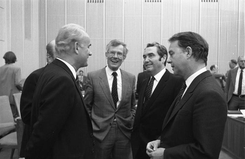 Bundesratssitzung Thema: Bundeshaushalt 1981, Sozialversicherungsgesetz für Kunstschaffende